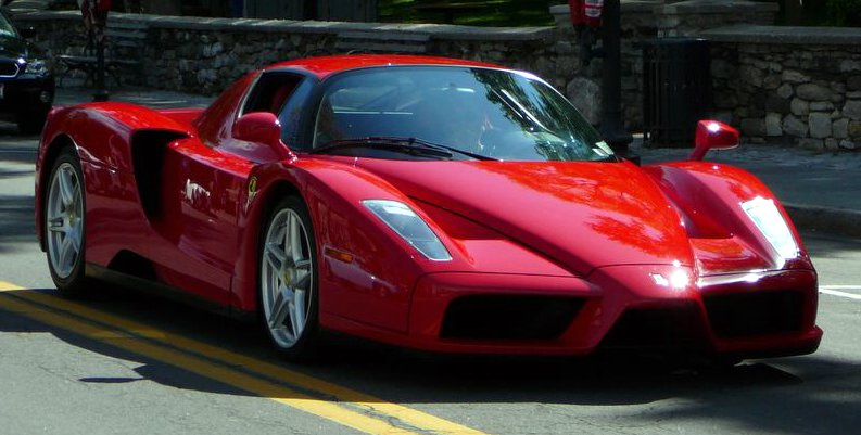 Ferrari Enzo. Nāhuatl: 2003 Enzo Ferrari.